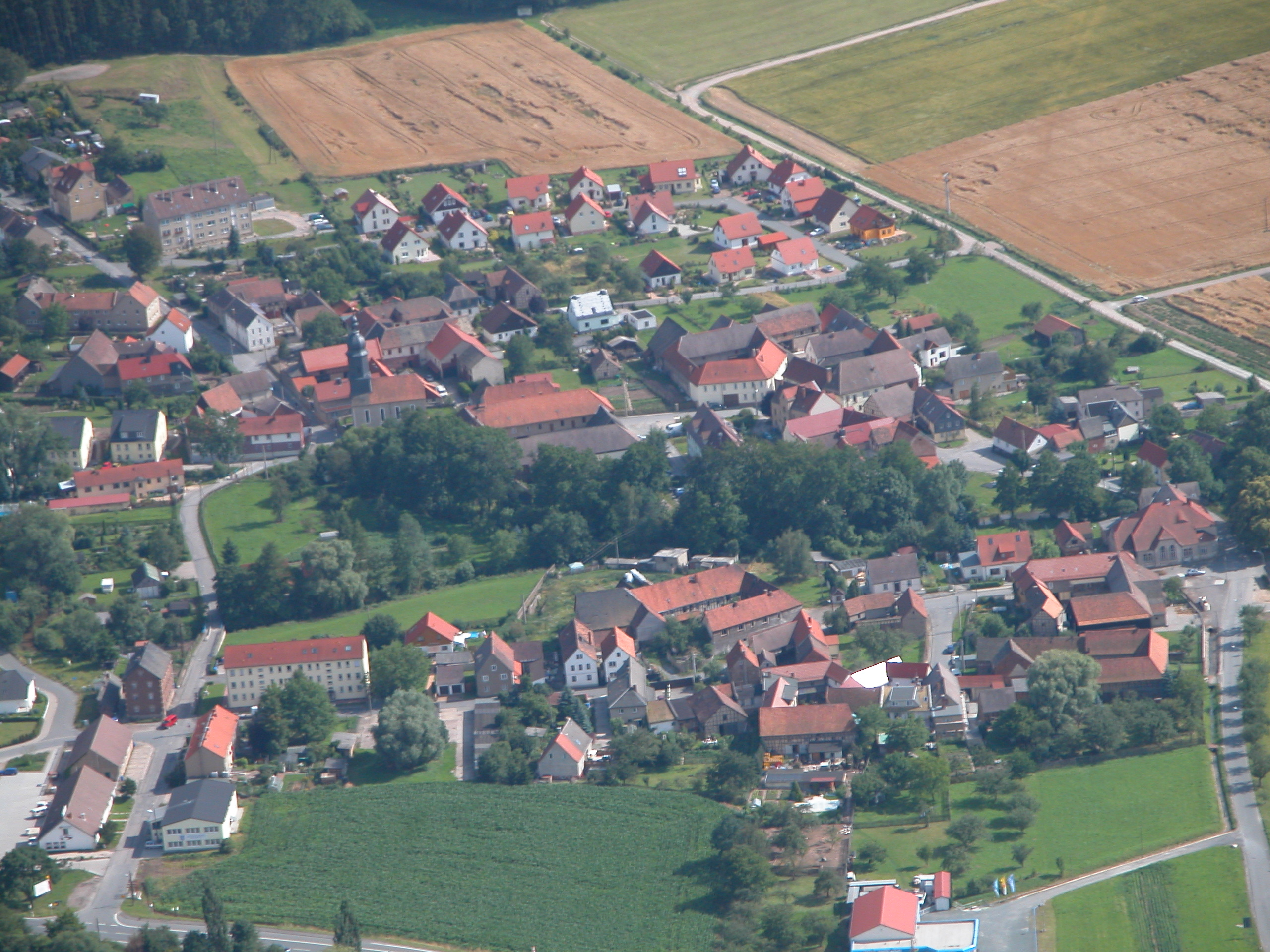 Luftbild von Laasdorf (SHK) This media has been provided by Thüringenfotos.